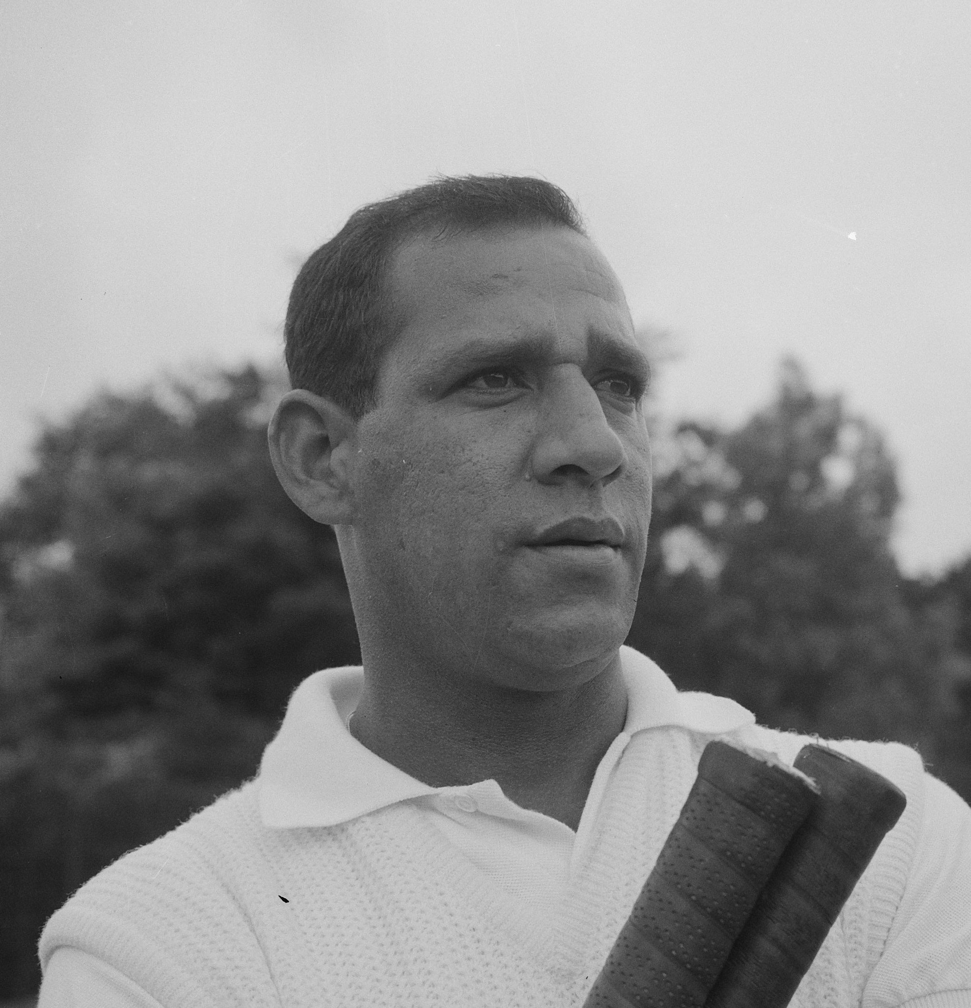 Internationaal tenniskampioenschap van Kennemerland, J. S. Pimentel (Venezuela) (kop)